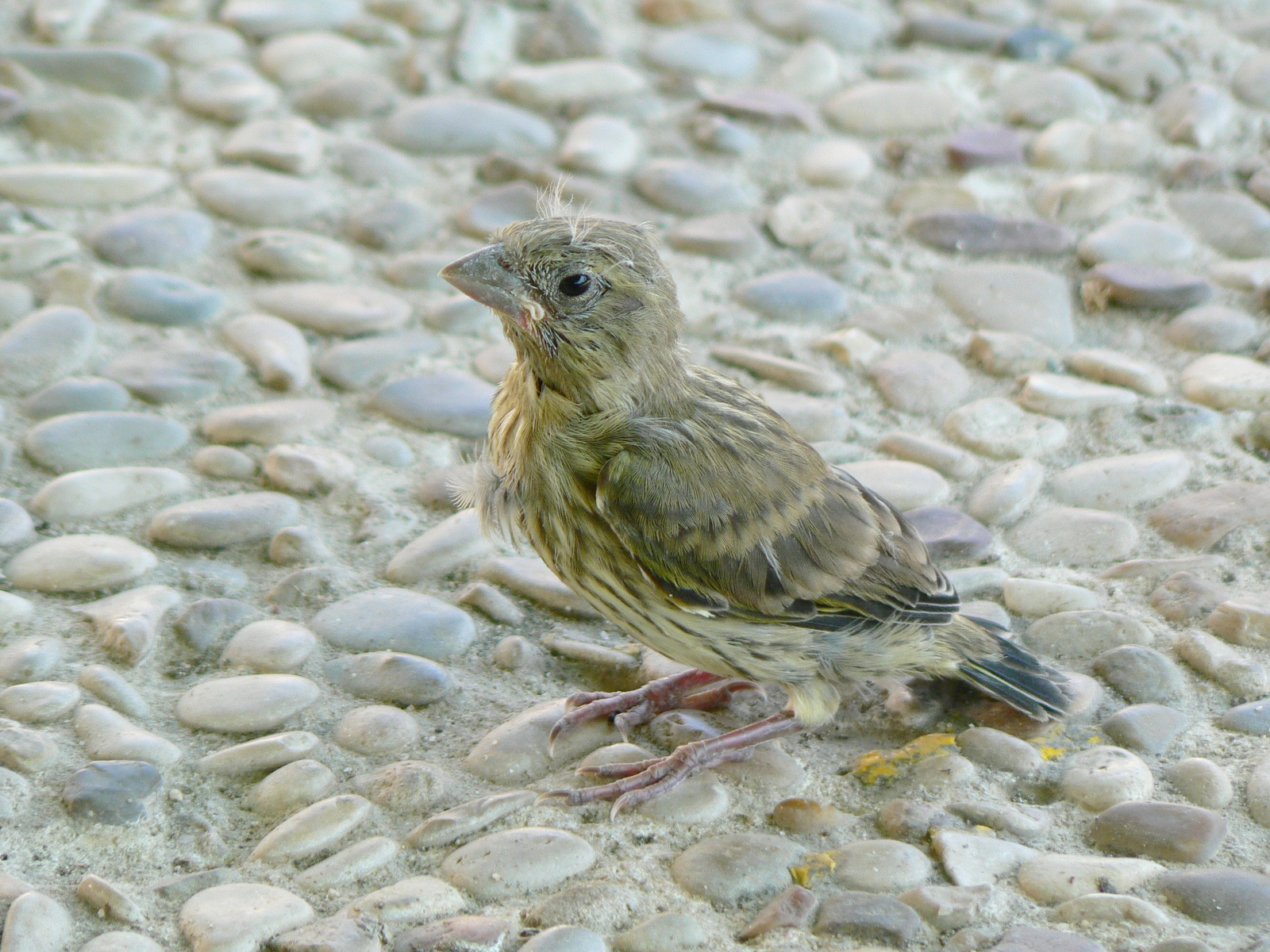 Juvenil de Verderón común (Carduelis chloris) en Guadalajara (España).